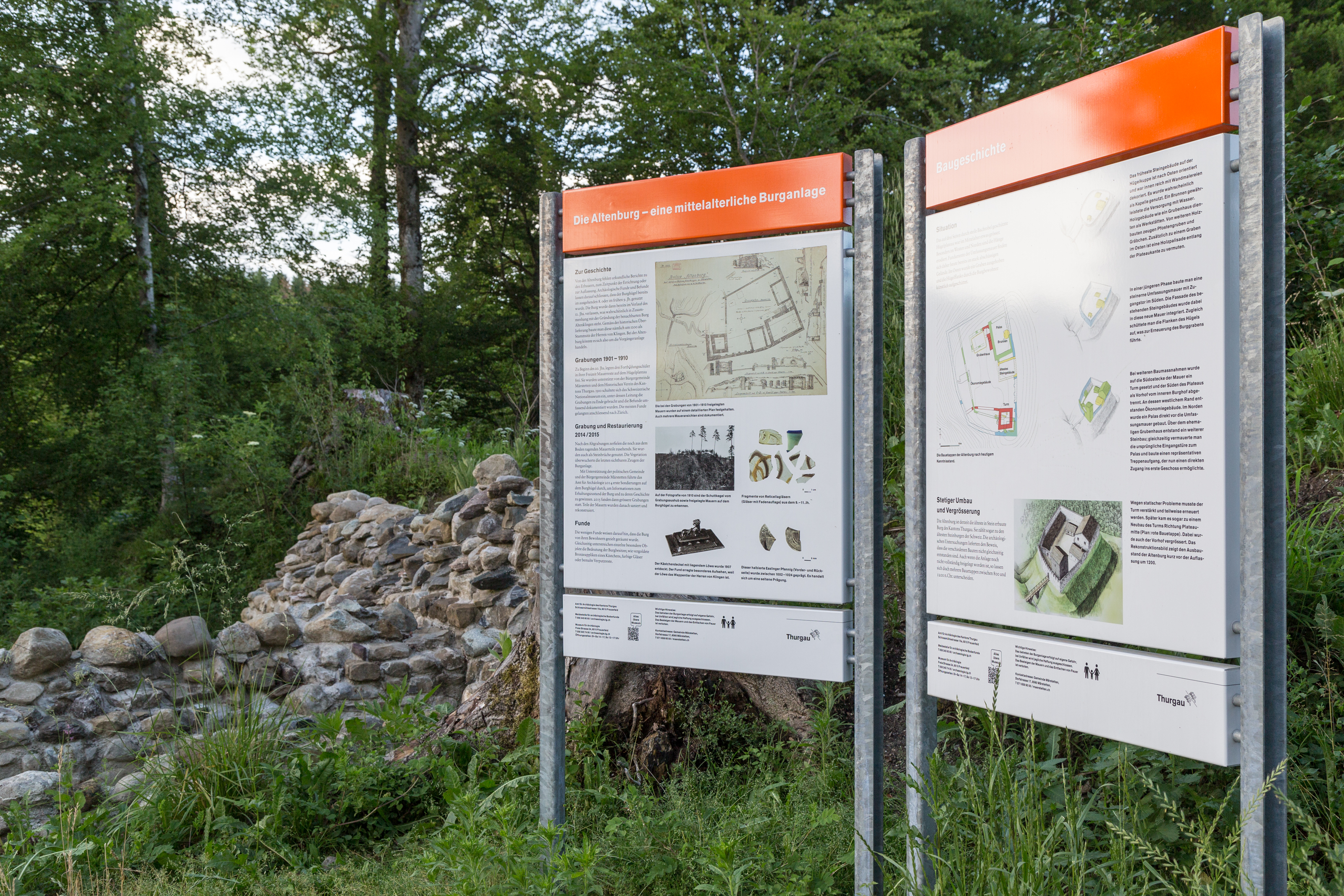 Infotafeln zur Burgruine Altenburg